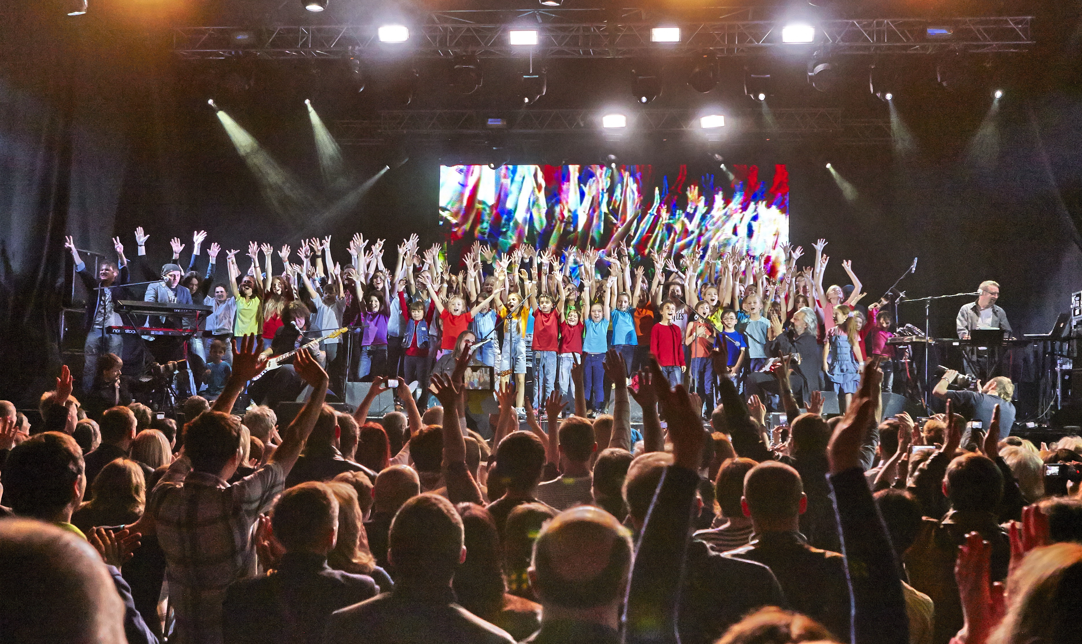 Культовая песня Джона Леннона, написана в 1969 году против войны во Вьетнаме и стала всемирным антивоенным гимном. Идея русской версии песни и исполнения ее вместе с детским хором на русском, украинском и английском языках появилась буквально за несколько дней до московского концерта группы Цветы 14 ноября 2014 года. Йоко Оно дала Цветам права на исполнение этой песни во всем мире, и она вошла в документальный фильм Джима Брауна Free to Rock (о влиянии рок-музыки на мировую политику).